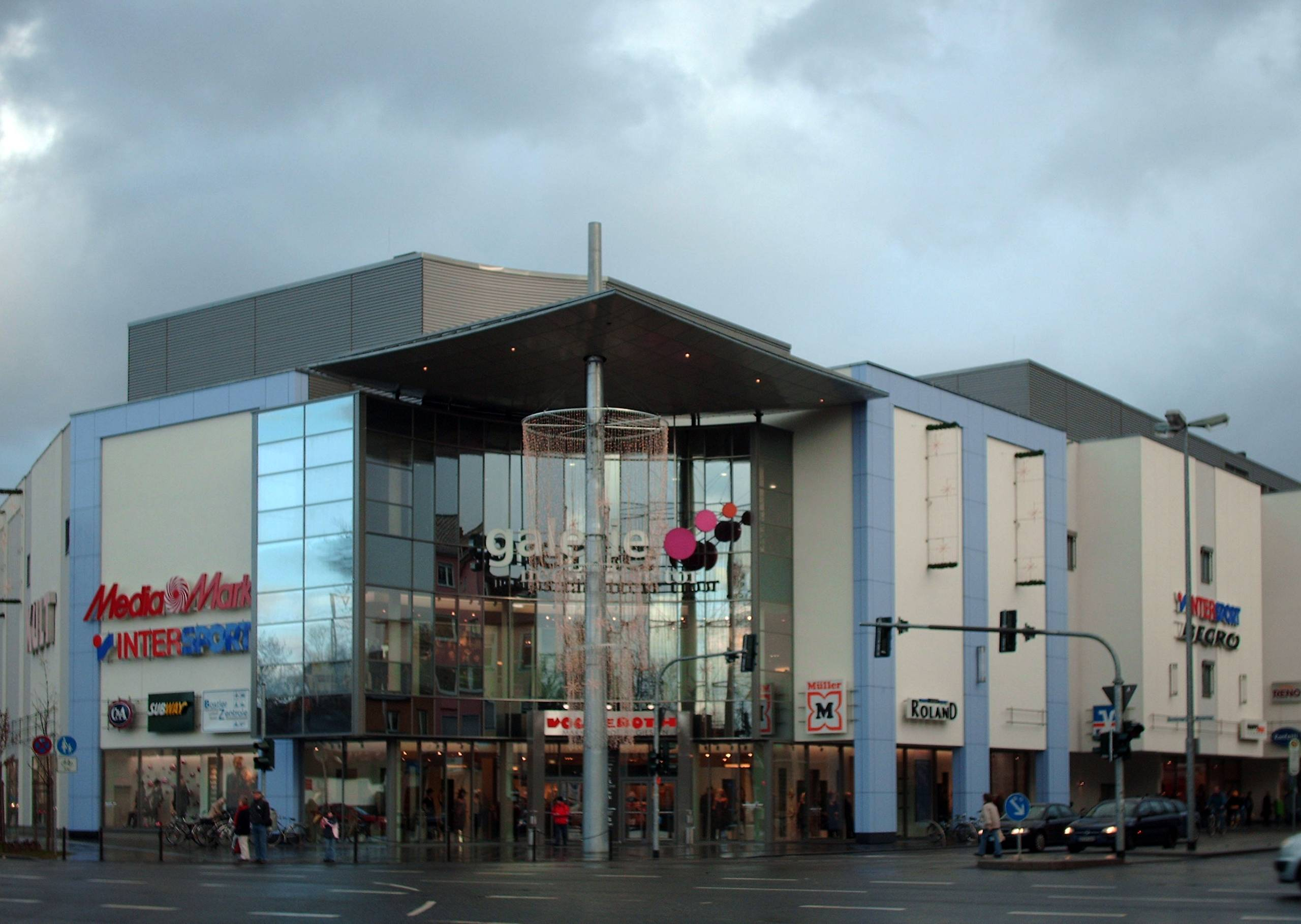 Einkaufszentrum Galerie Neustädter Tor, Gießen, Deutschland